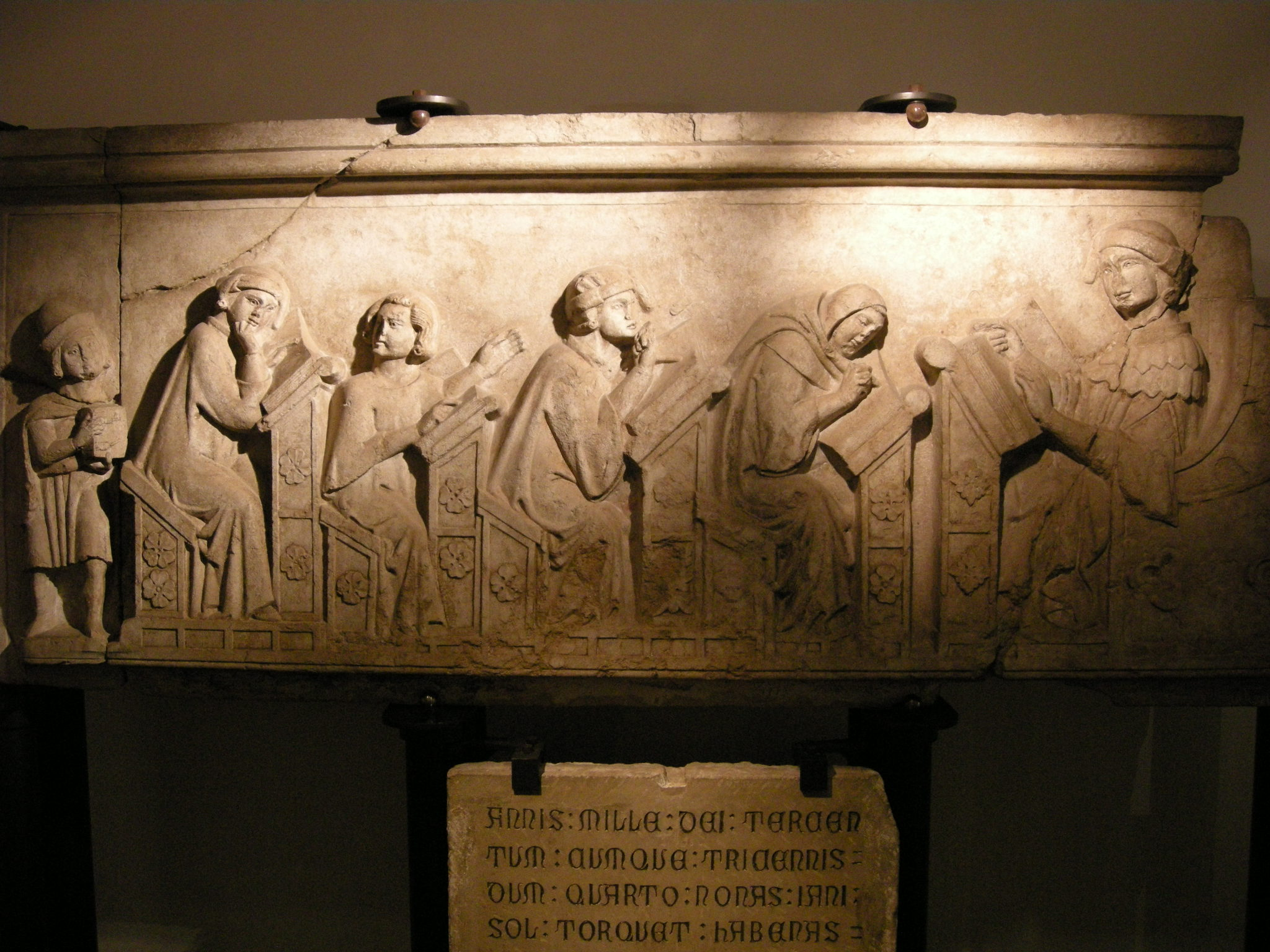 Sarcophagus of Matteo Gandoni (+ 1330), from the cloister of San Domenico a Bologna, now a the Museo civico medievale a Bologna. Inventory number: #1666. The relief depict Matteo Gandoni teaching to a class of students. On the left, a porter bringing a book